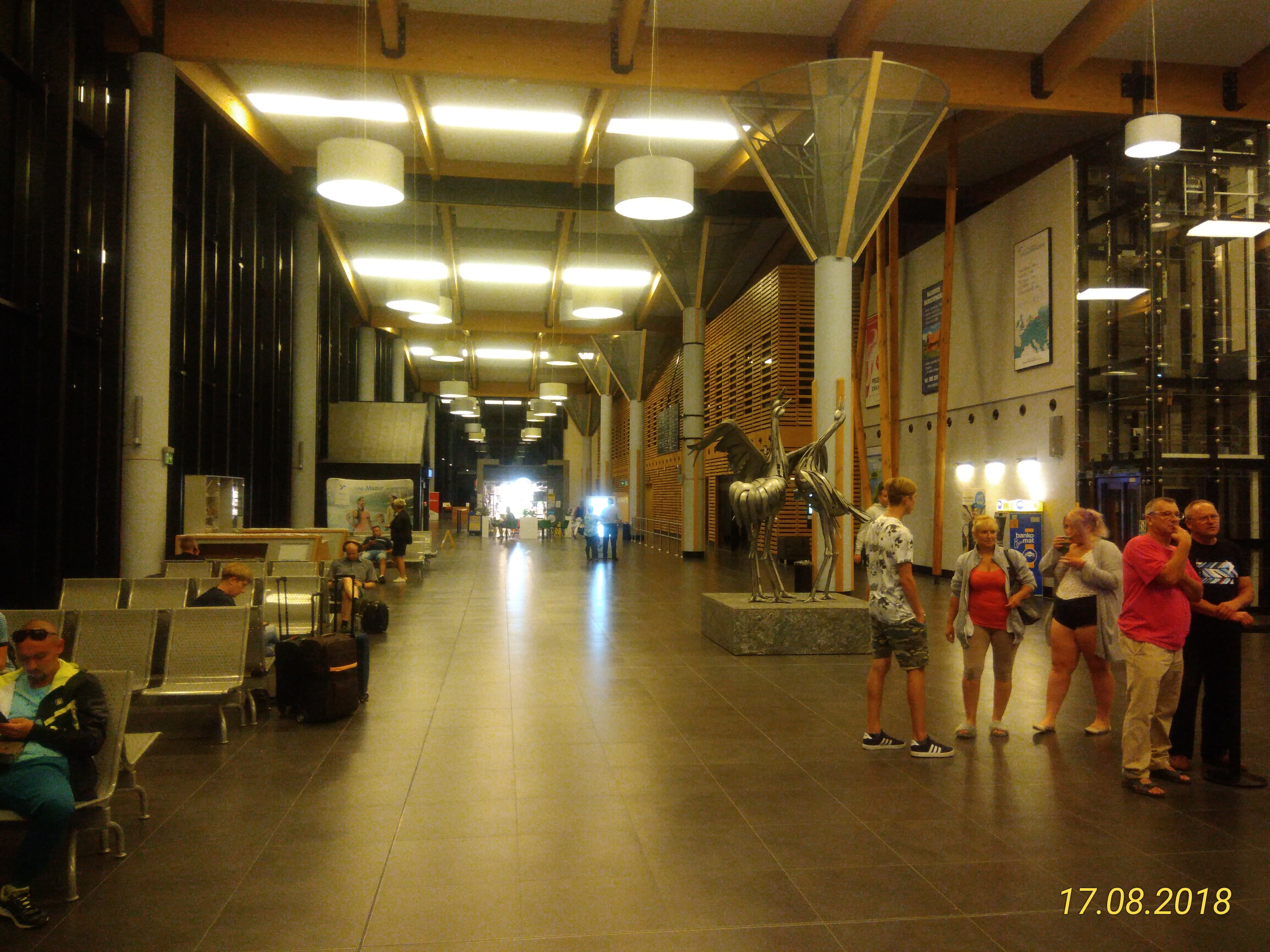 Wnętrze terminala Olsztyn-Mazury